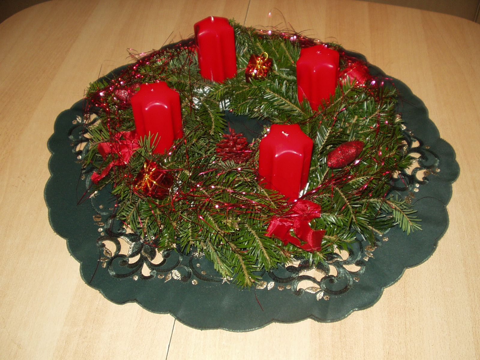 Adventný veniec